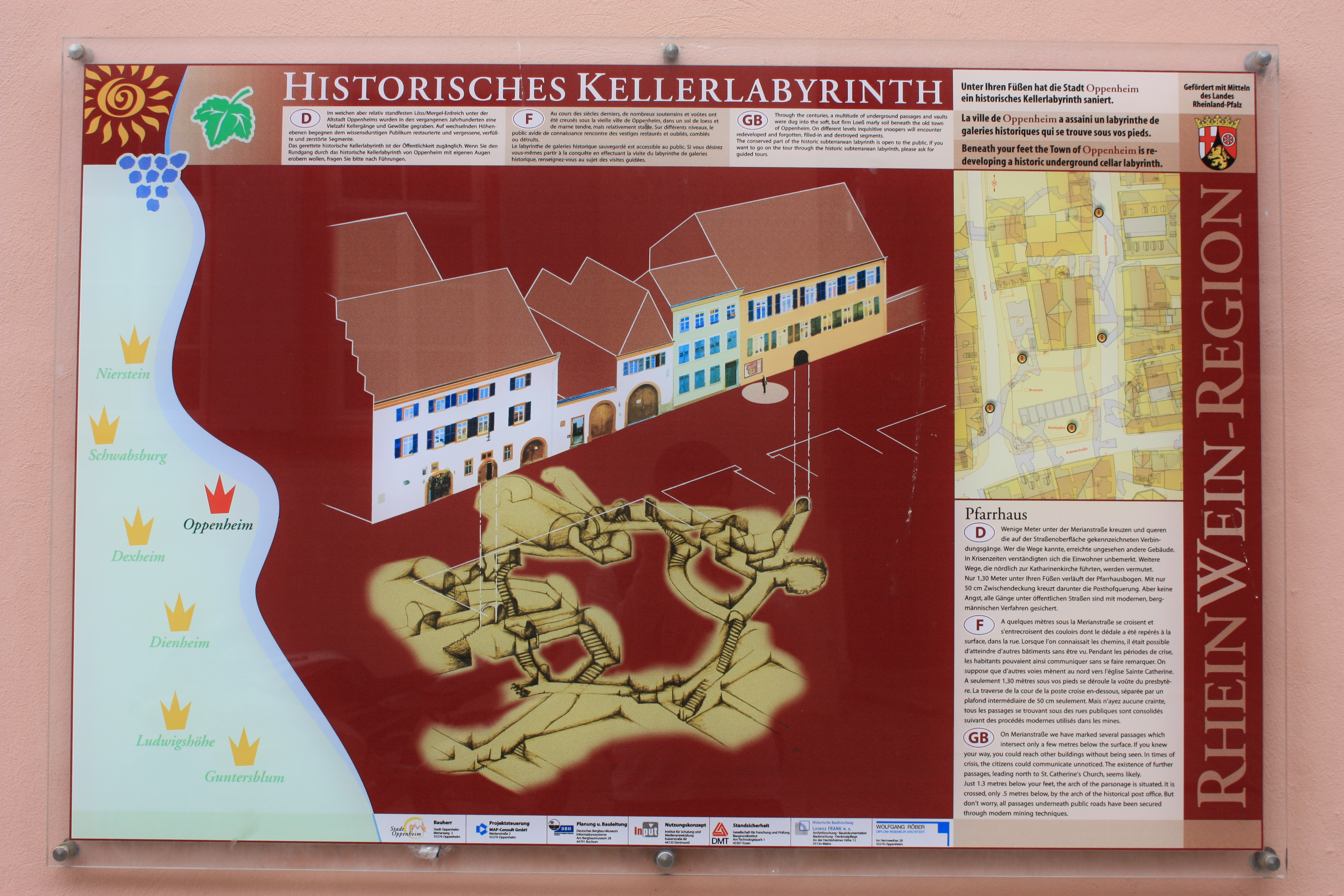 Touristeninformation Infotafel Historisches Kellerlabyrinth Oppenheim